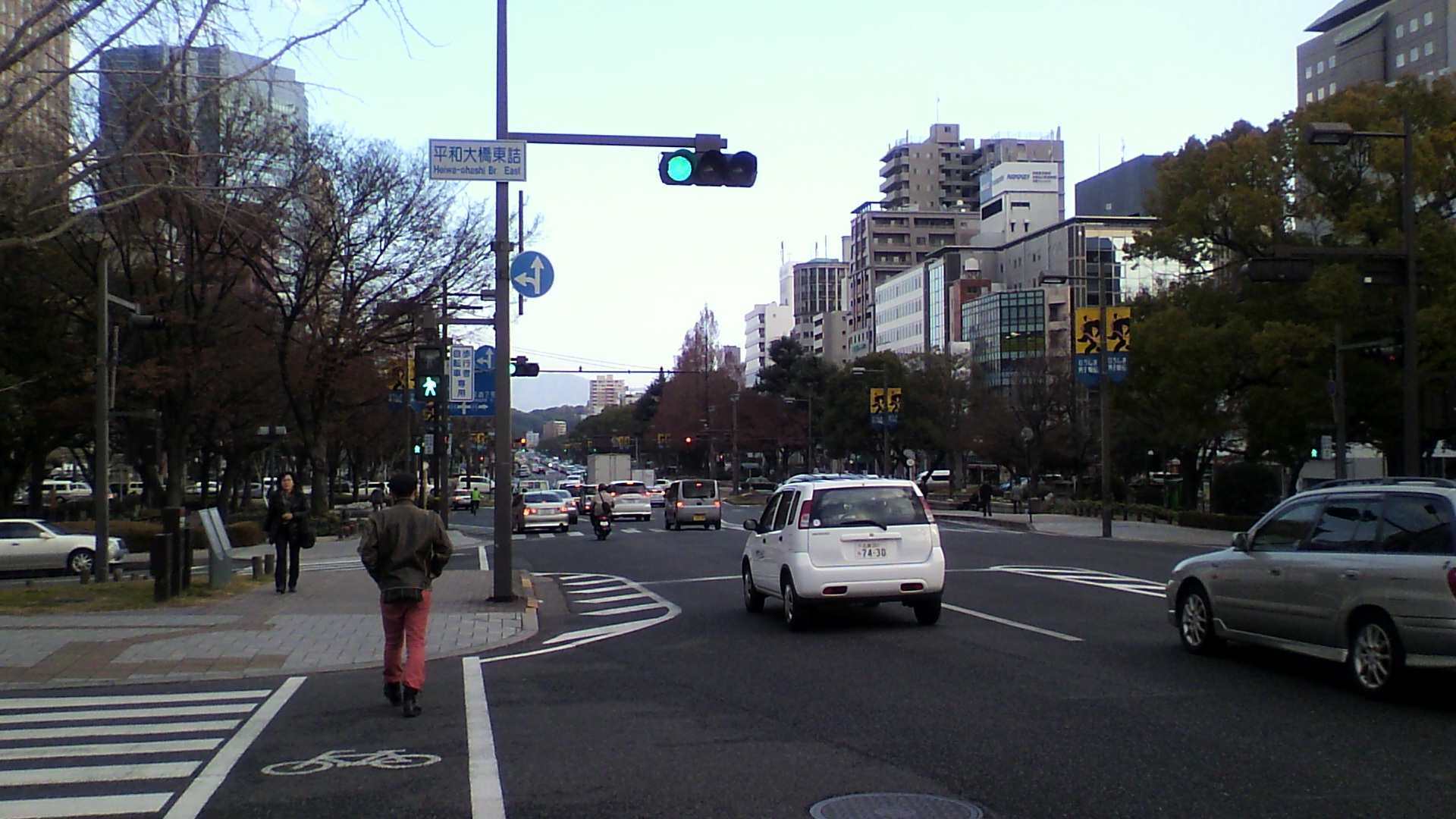 広島市平和大通り。平和大橋東詰交差点にて。